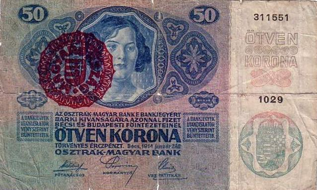 50 Austro-Hungarian Kronen/korona, 1919 stamped Issue für Hungary - obverse